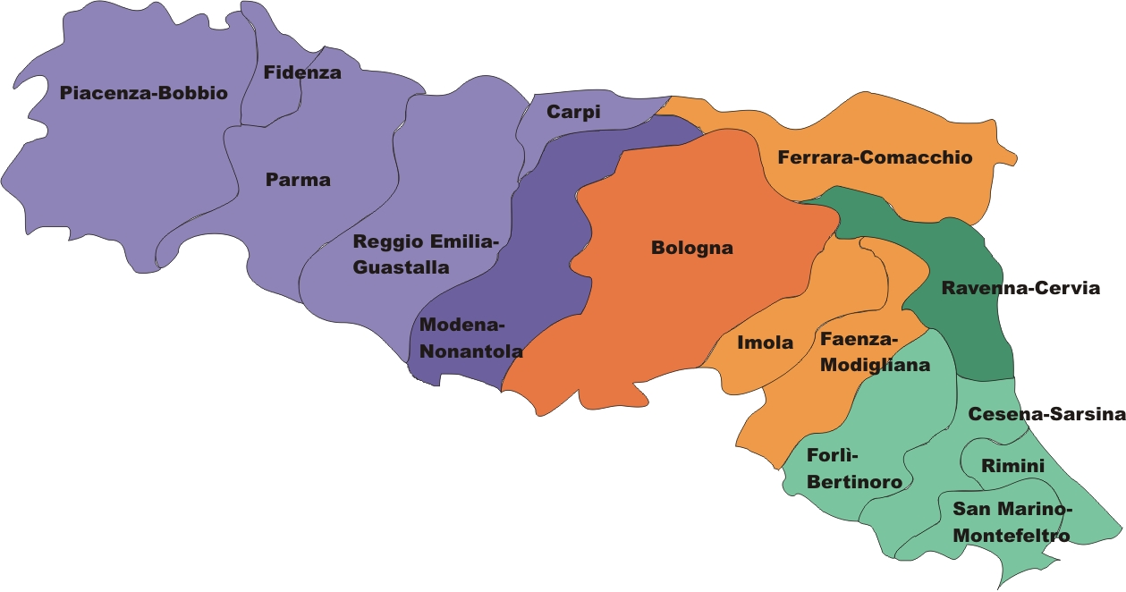 Mapa de la regió eclesiàstica Emília-Romanya